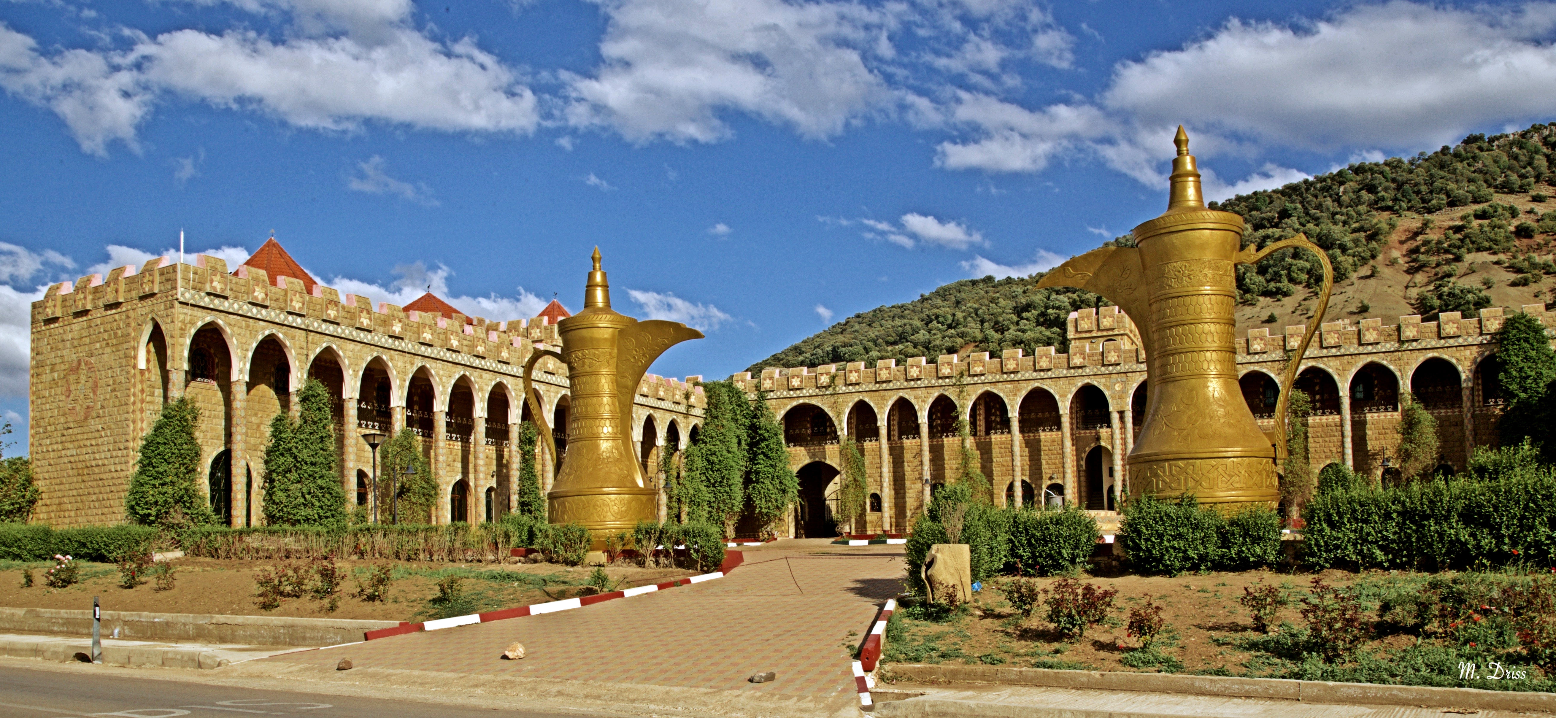 Hotel dans la région d'Azrou